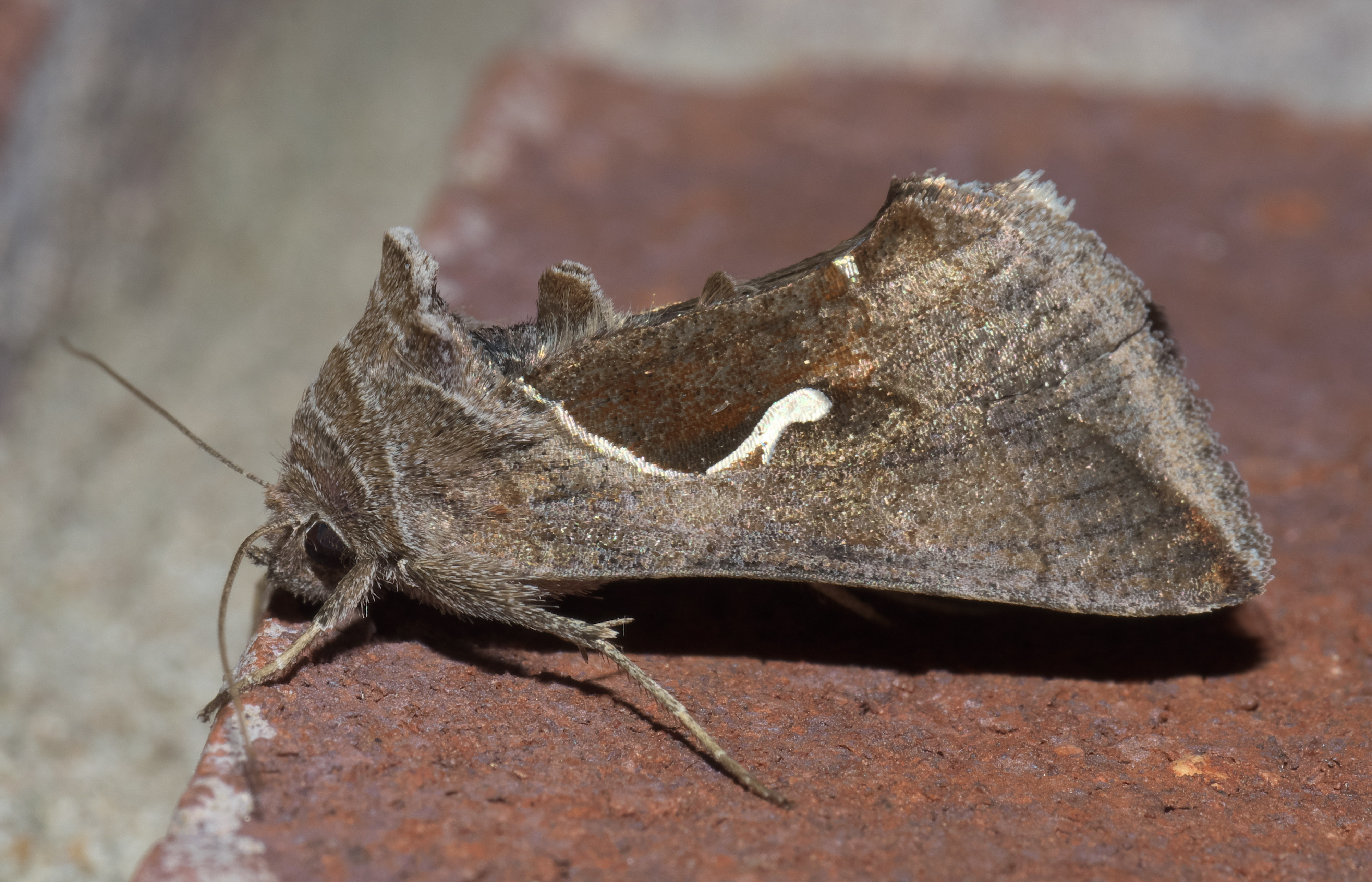 Anagrapha falcifera, celery looper, ID Confidence: 90